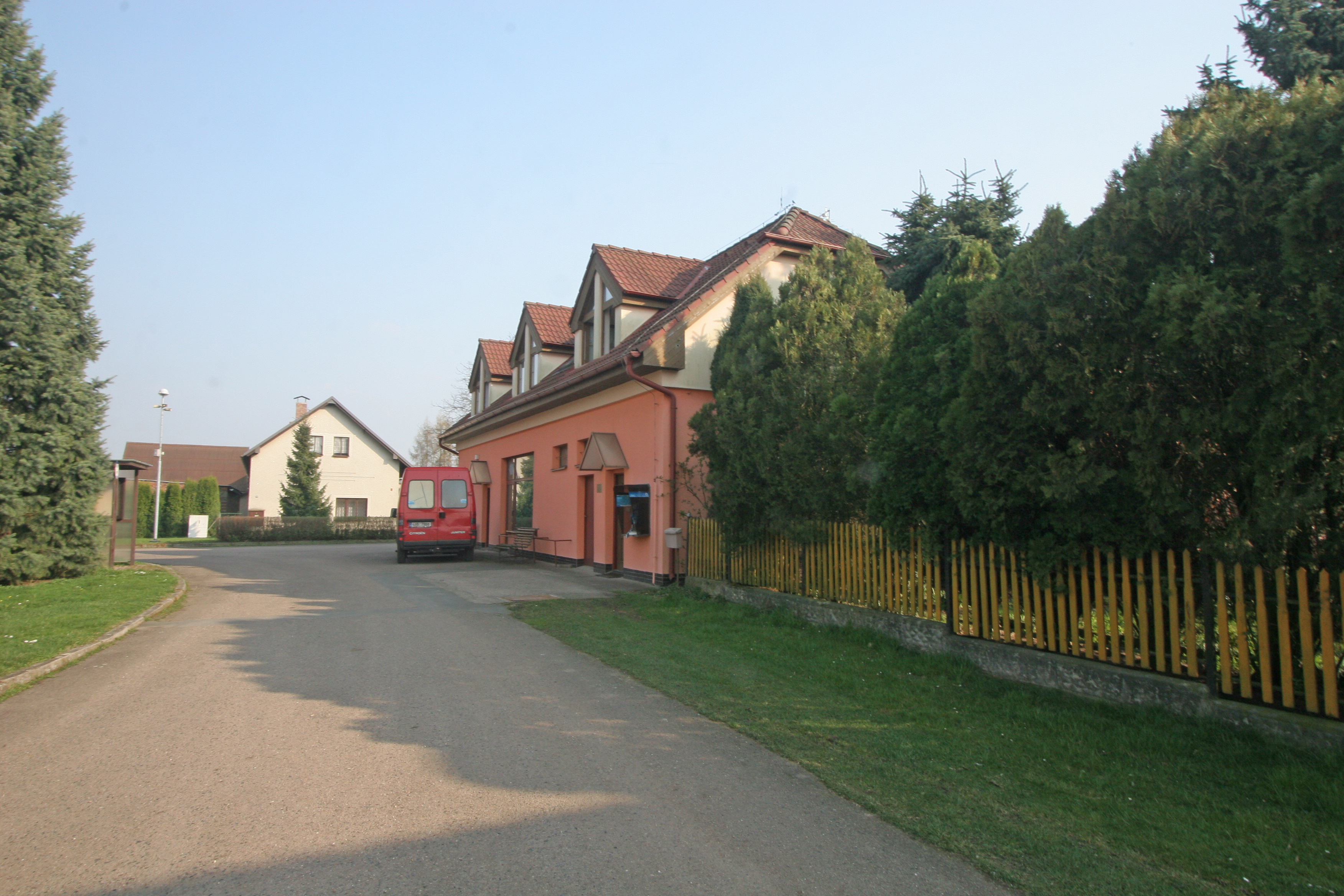 Pšánky obecní úřad